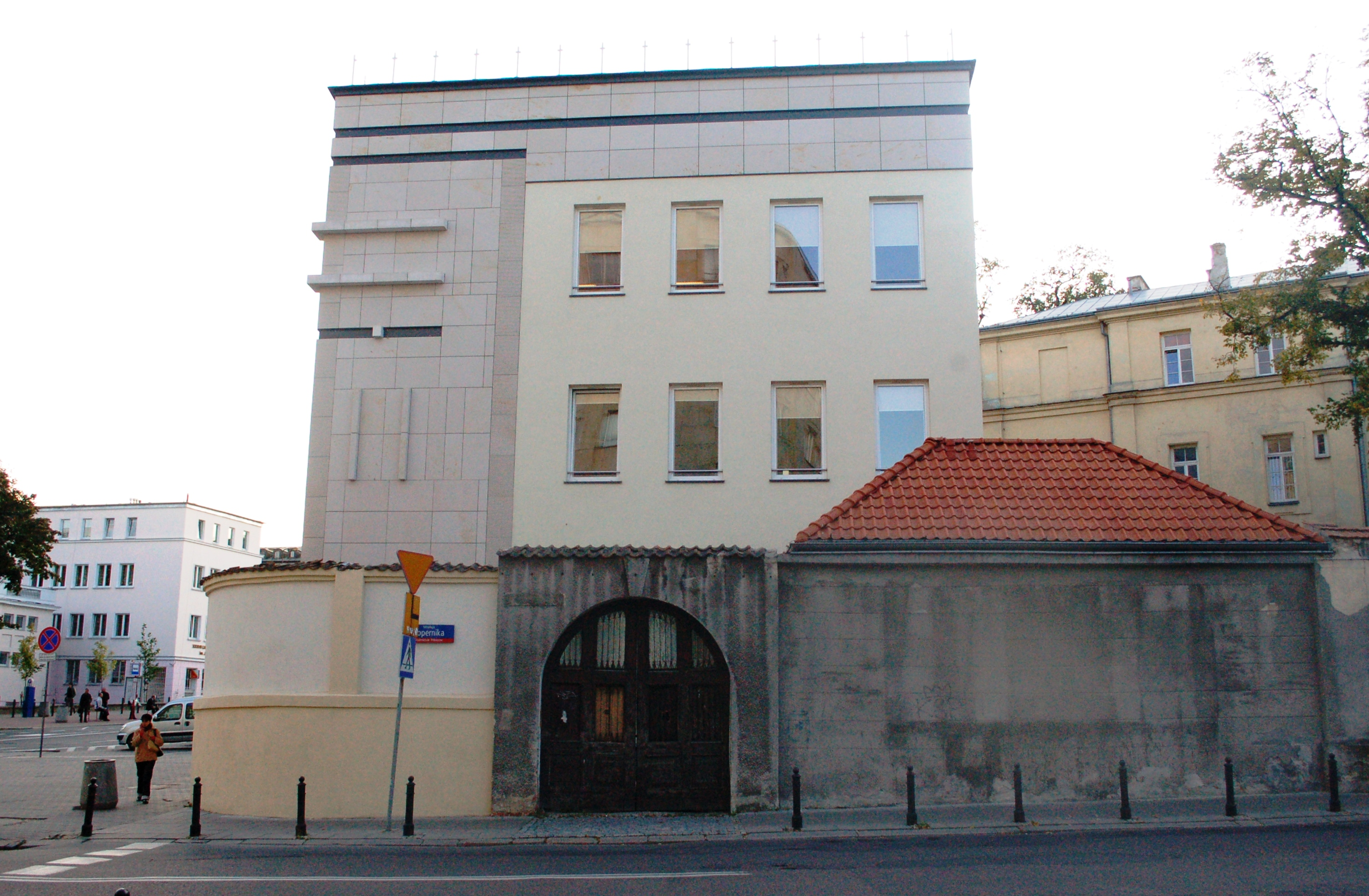 Warschau